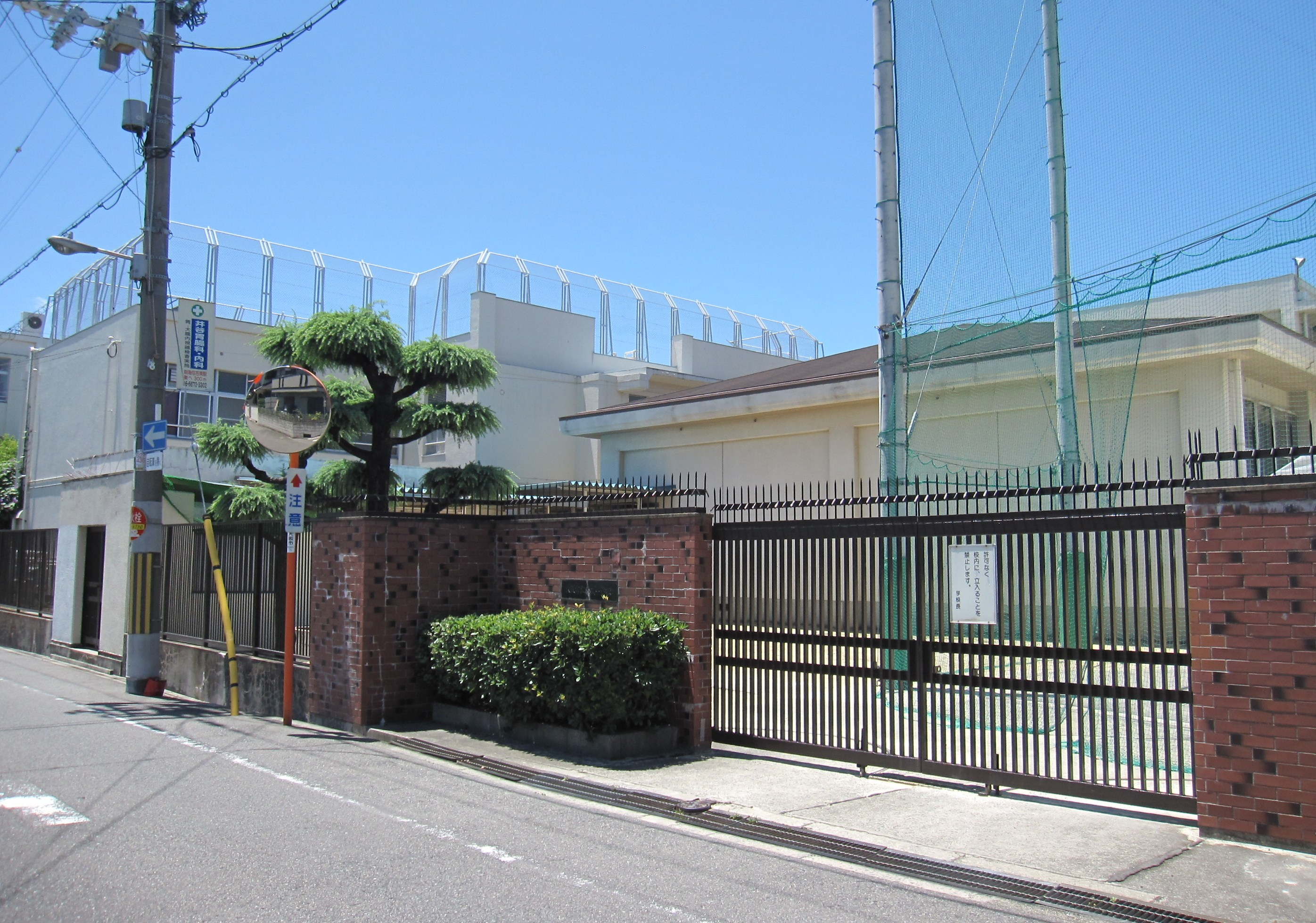 大阪市立大領中学校